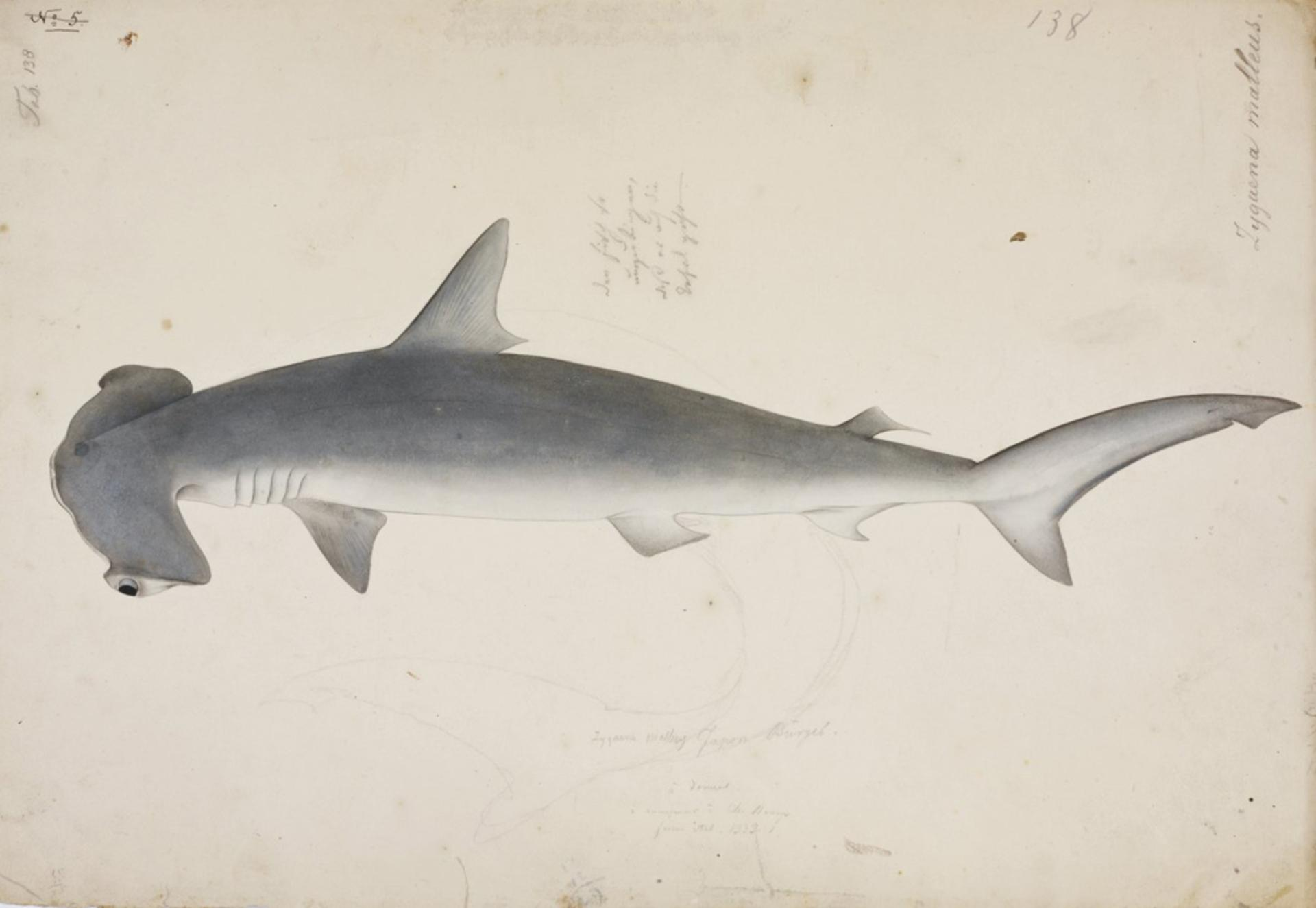 Sphyrna zygaena